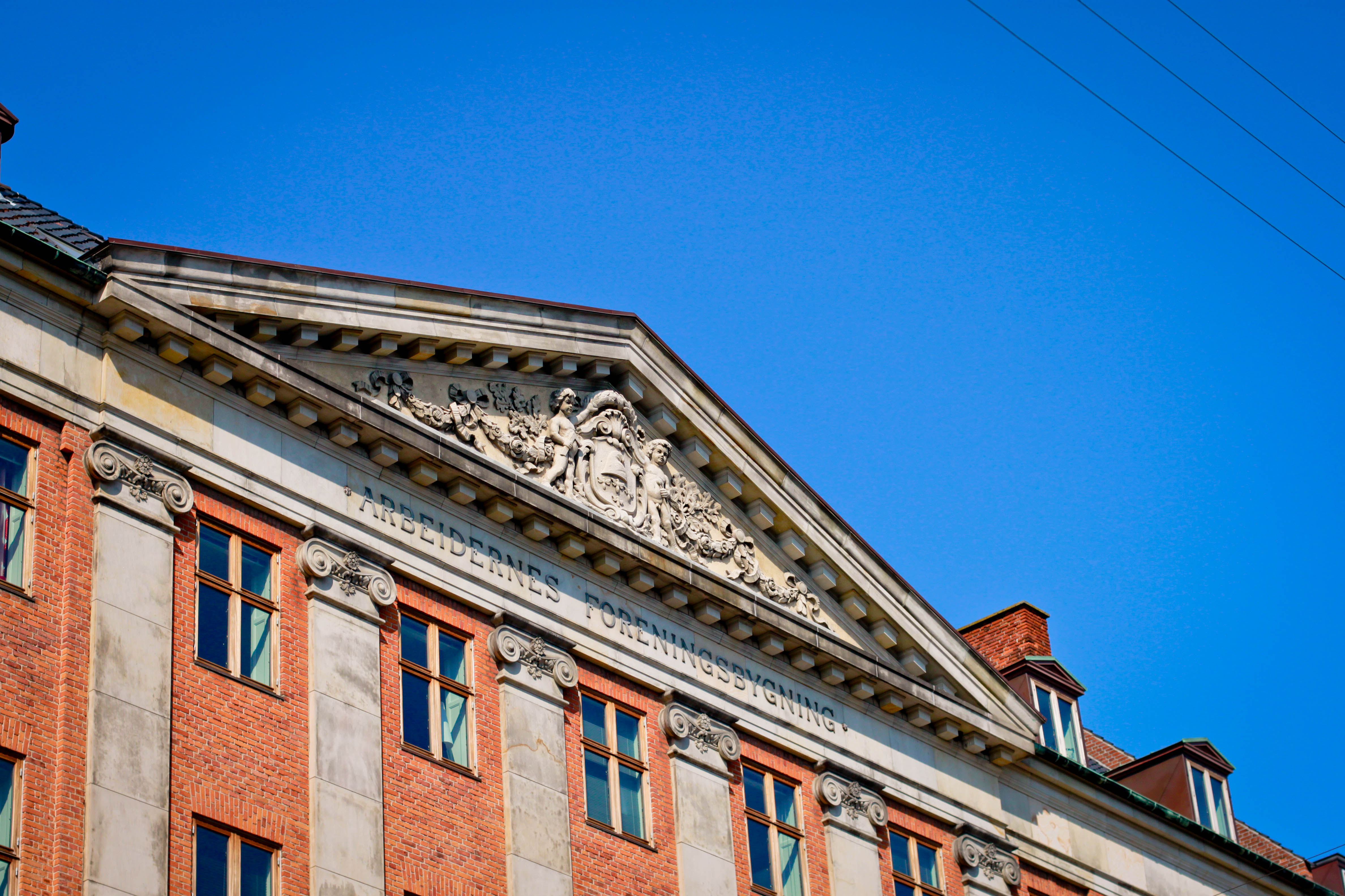 Arbejdernes Foreningsbuilding on Rosenørns Allé in Copenhagen, Denmark